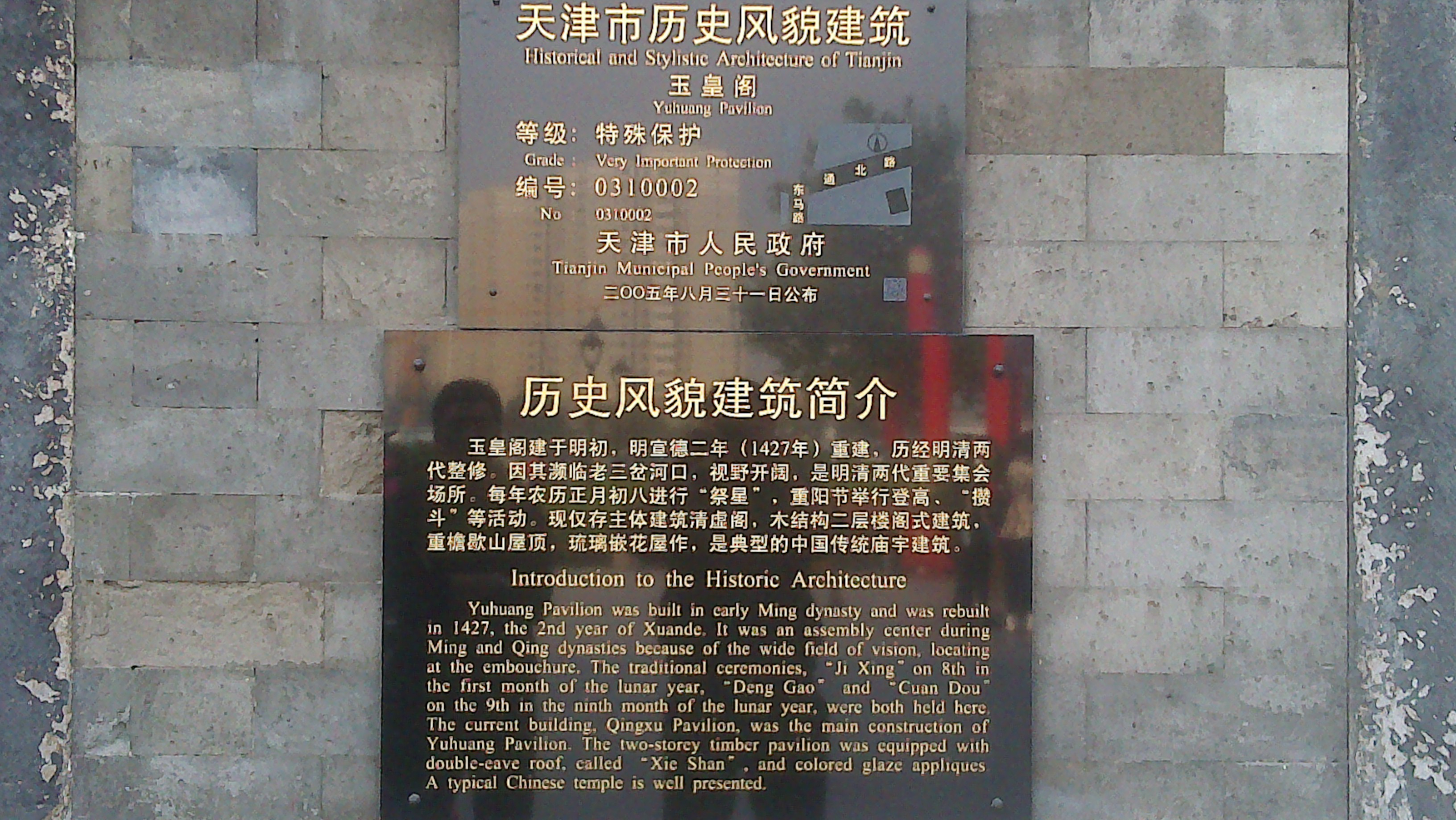 天津衛玉皇閣標識簡介